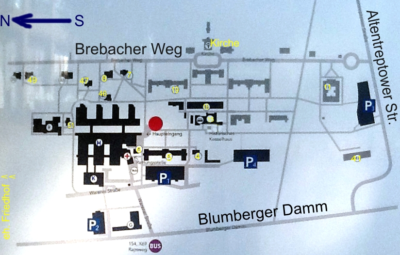 Wuhlgarten-Gelände, Lageplan im Jahr 2015, Unfallkrankenhaus Berlin